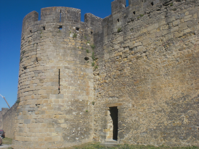 Muregoj de Karkasuno